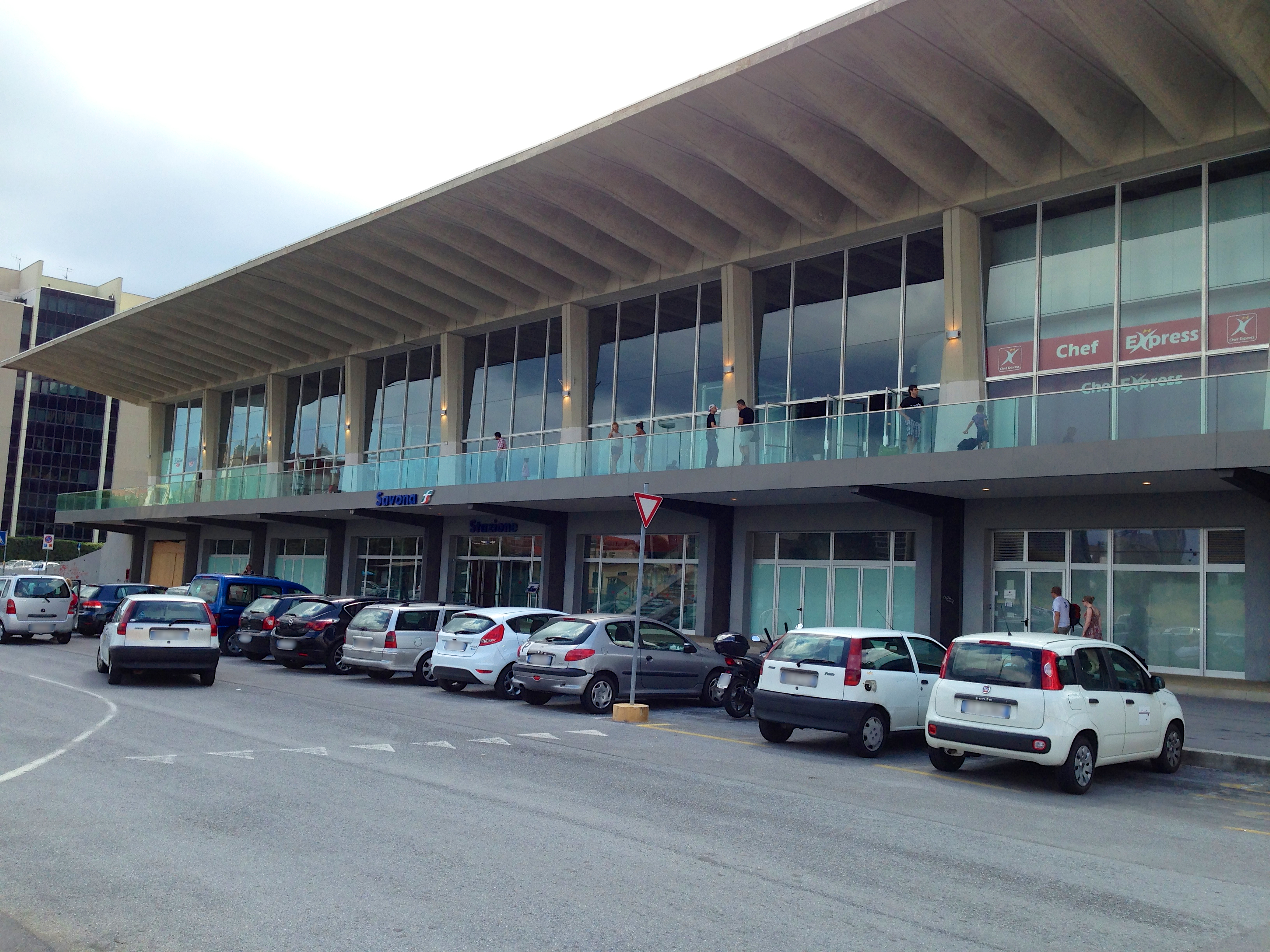 Stazione ferroviaria di Savona